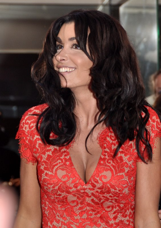 Jenifer à l'enregistrement de "Champs-Elysées"